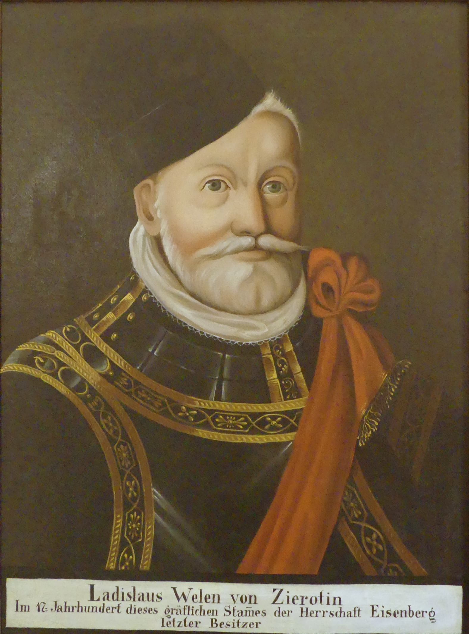 Ladislav Velen ze Žerotína (1579 - 1638), zámek Moravská Třebová